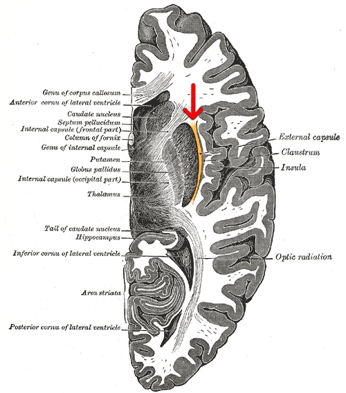 External capsule.